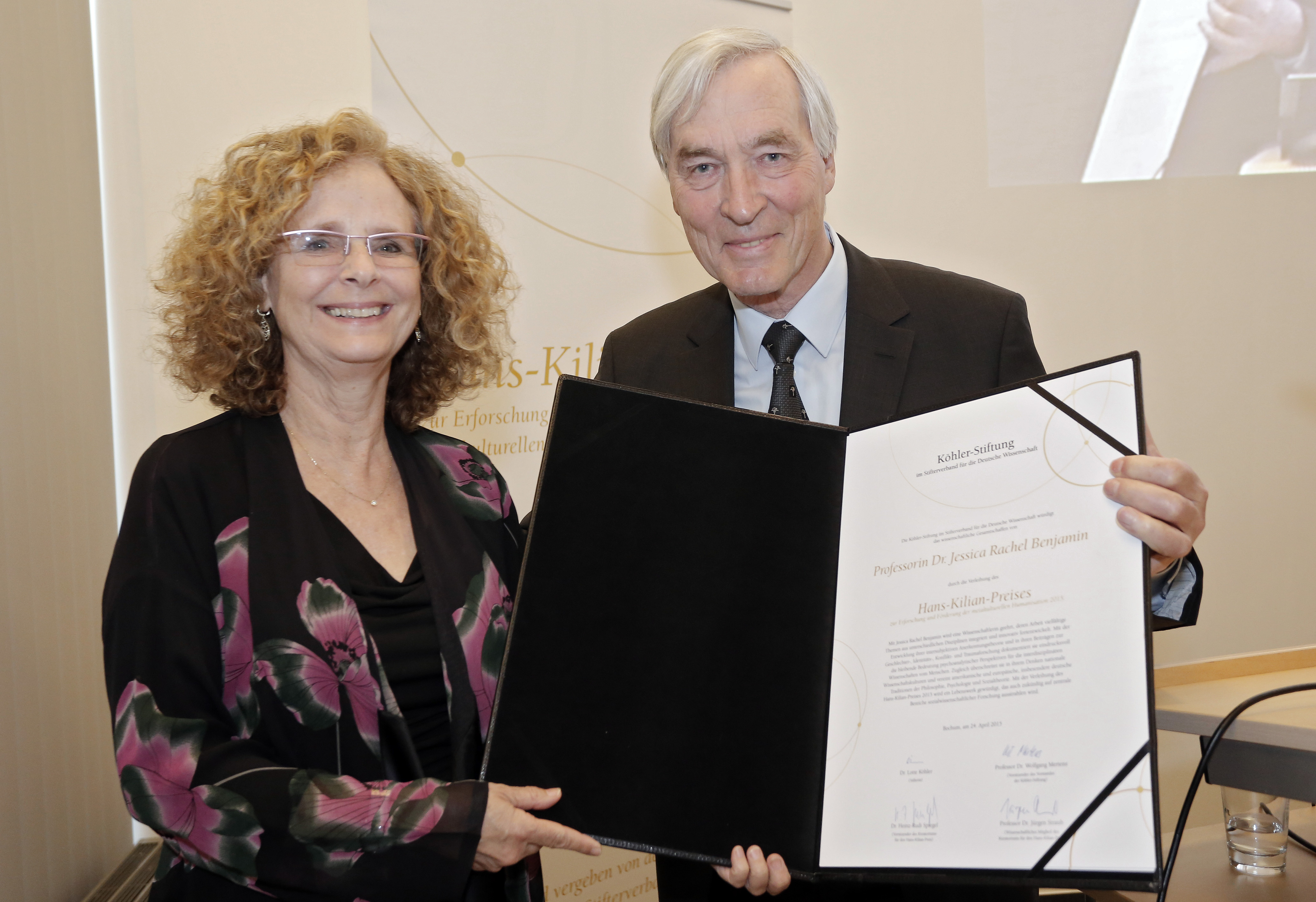 Preisträgerin Jessica R. Benjamin, Vorstandvorsitzender Wolfgang Mertens